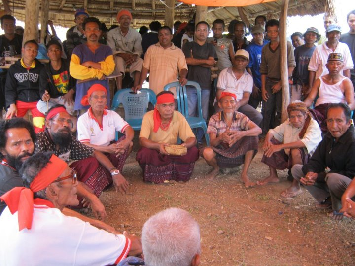 Acara Helok Korke di korke.